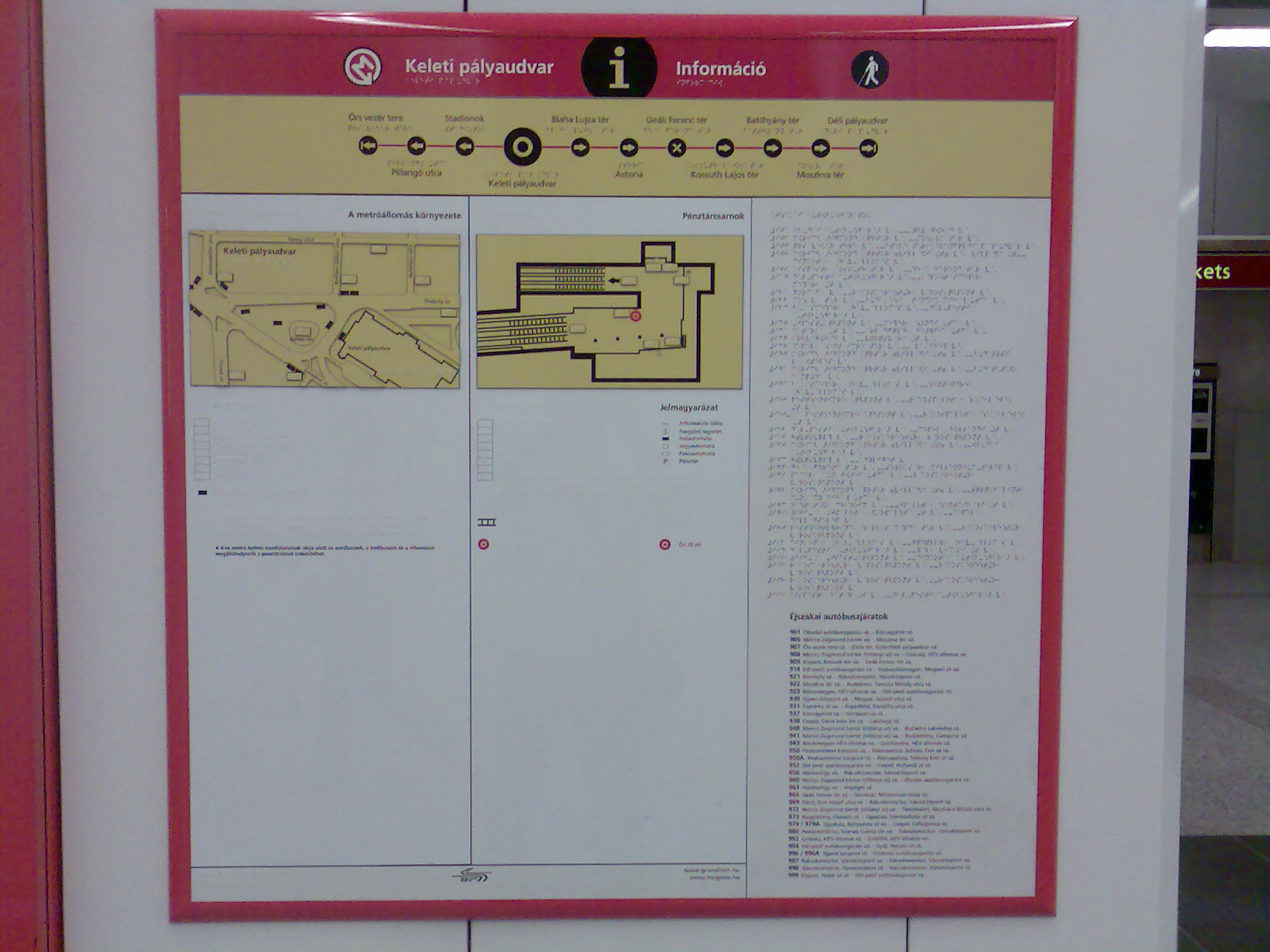 Braille-írásos információs tábla a 2-es metróban, Budapest-Keleti pályaudvar